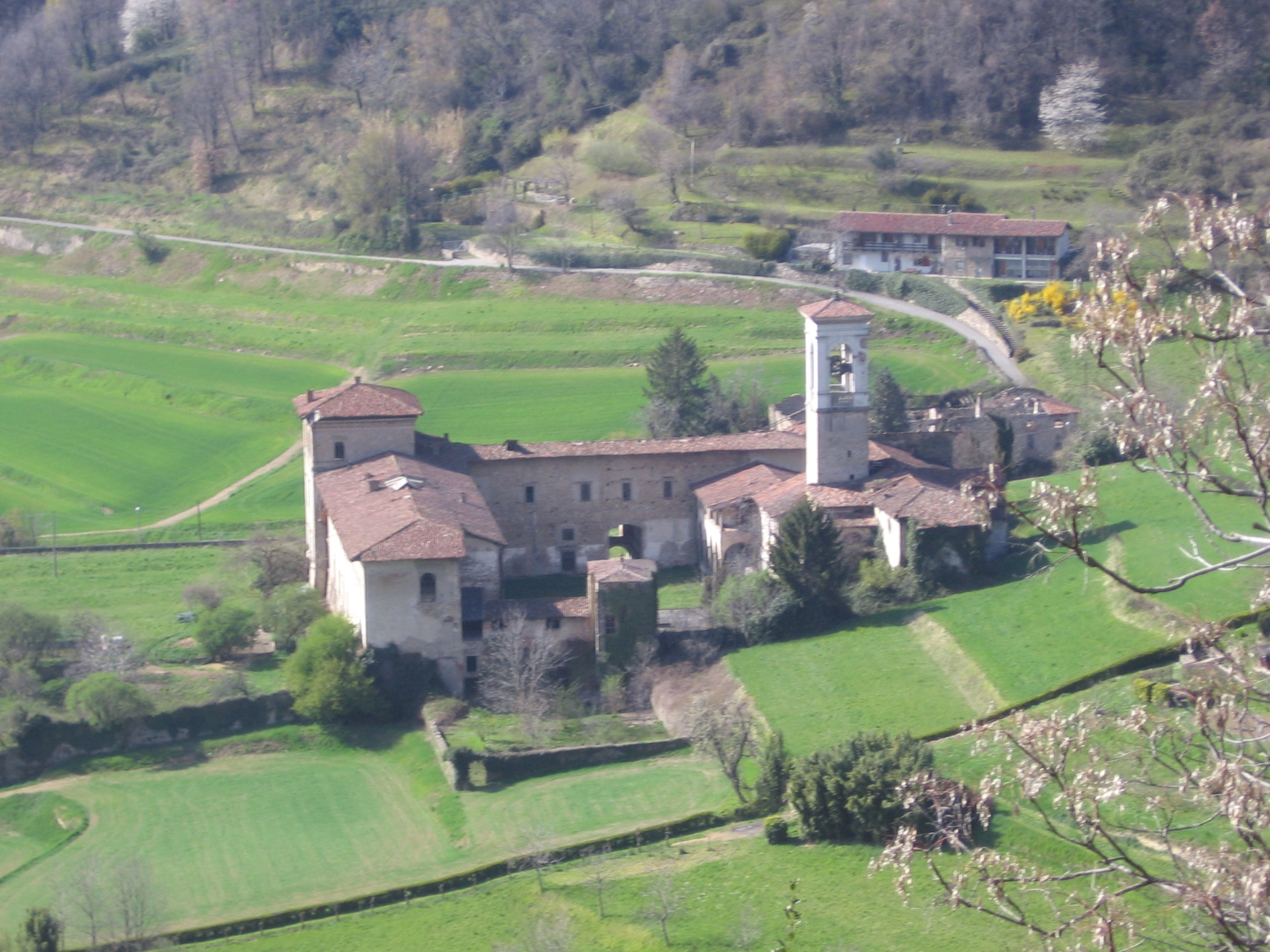 Astino, Bergamo, Italy